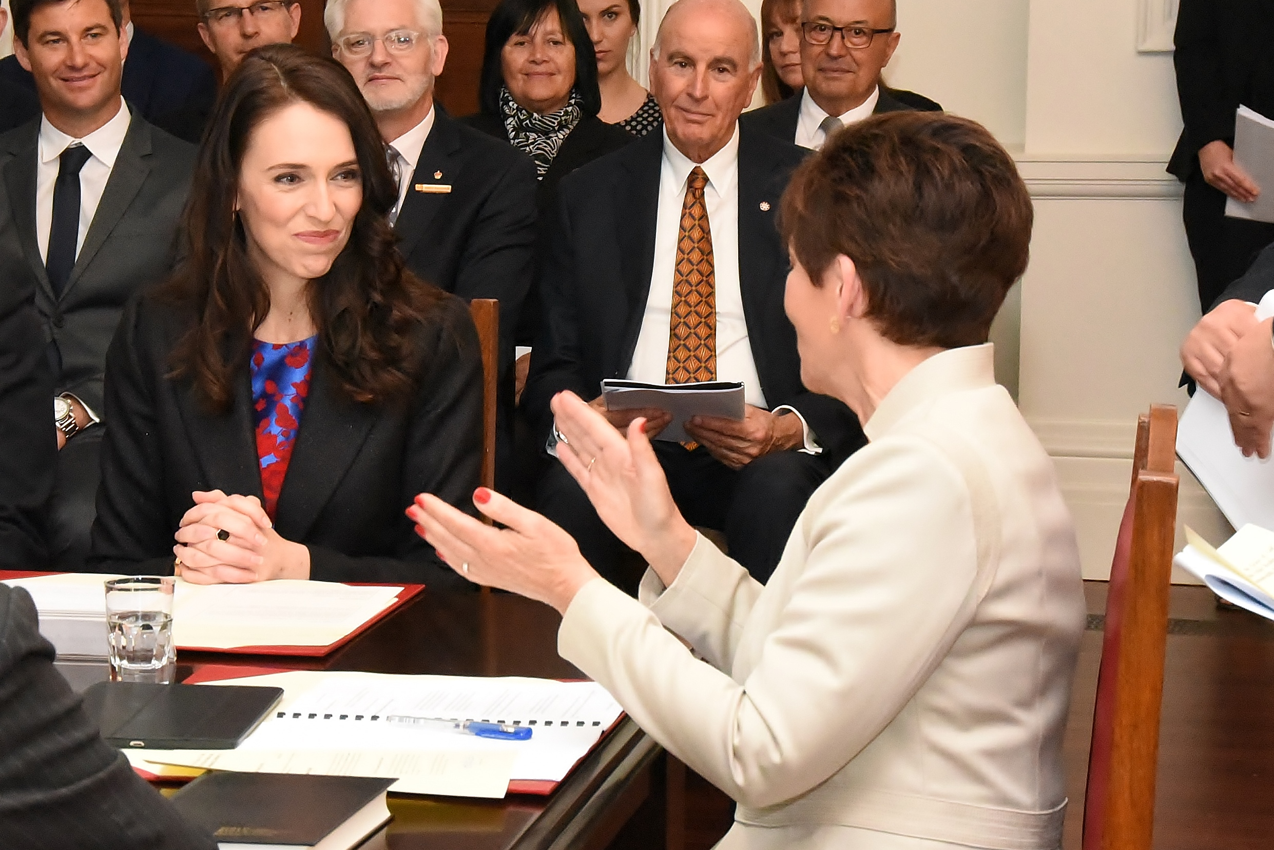 Dame Patsy Reddy (Governor General) with PM-designate Jacinda Ardern before the Swearing-in